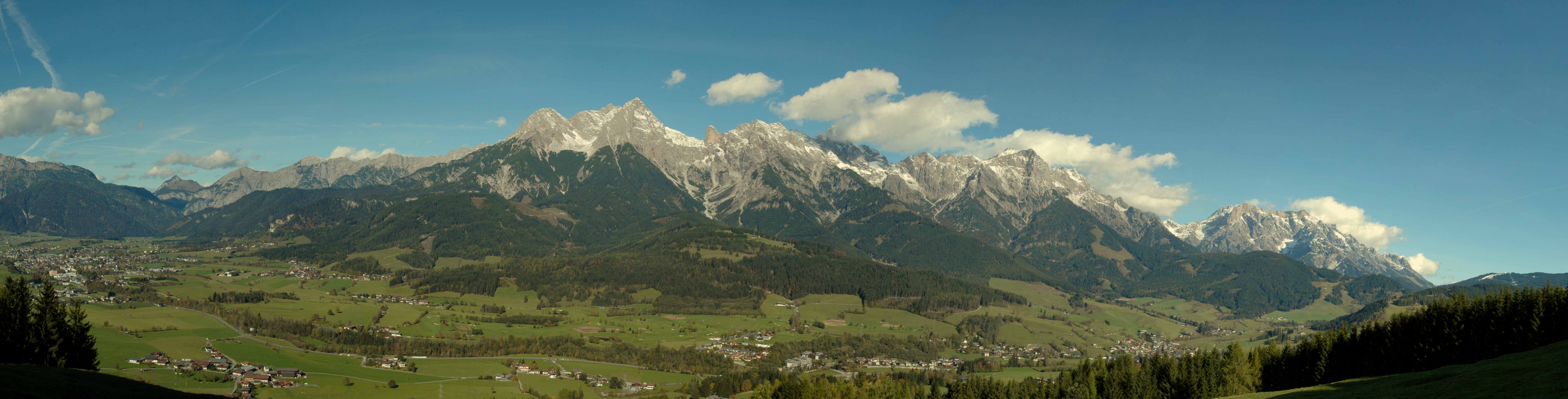 Im Zentrum liegen die Gipfel des Steinernen Meeres, Östlich davon das Hochkönigsmassiv. Westlich sind das Durchbruchstal der Saalach und die Ausläufer der Leoganger Steinberger ersichtlich. Im Vordergrund liegt die Gemeinde Maria Alm am Steinernen Meer, westlich davon die Stadt Saalfelden am Steinernen Meer. This media shows the nature reserve in Salzburg with the ID NSG00012.